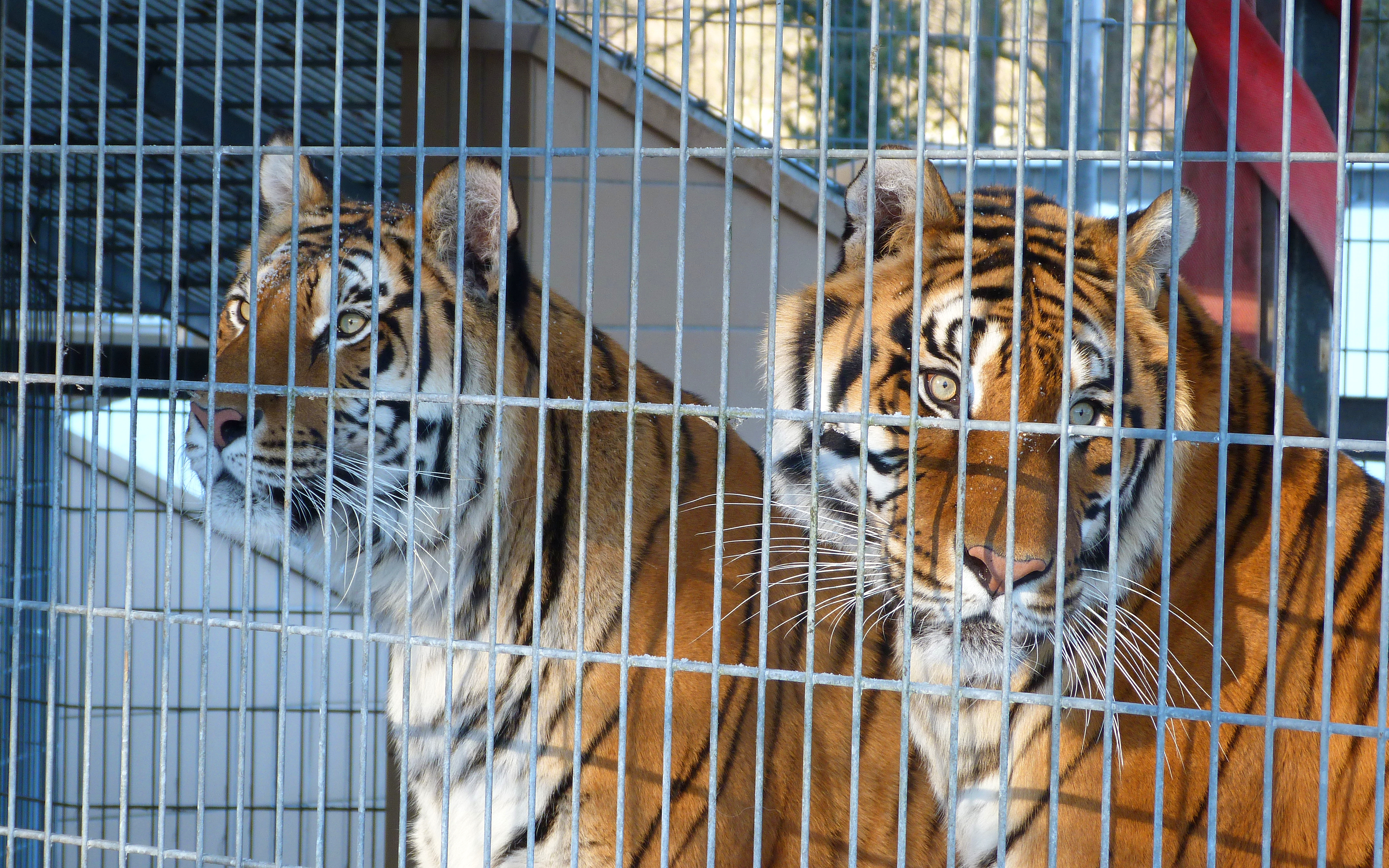 Tiger im Raubtier- und Exotenasyl (Wallersdorf)